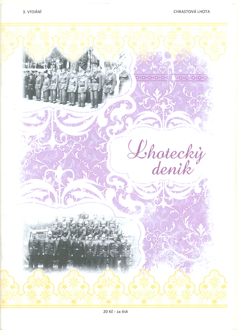 místní zpravodaj